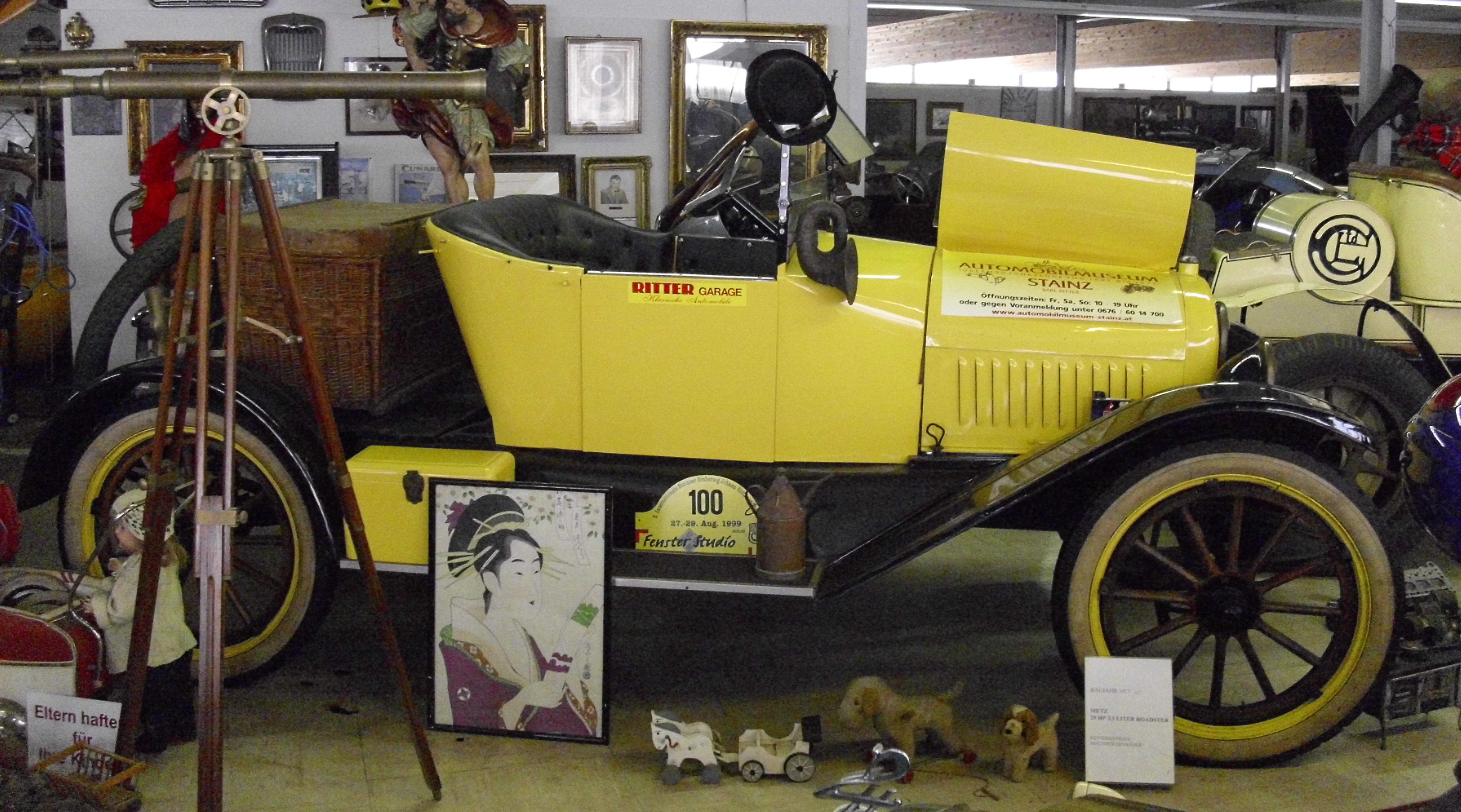 Metz 25 HP 1917 im Automobilmuseum Stainz